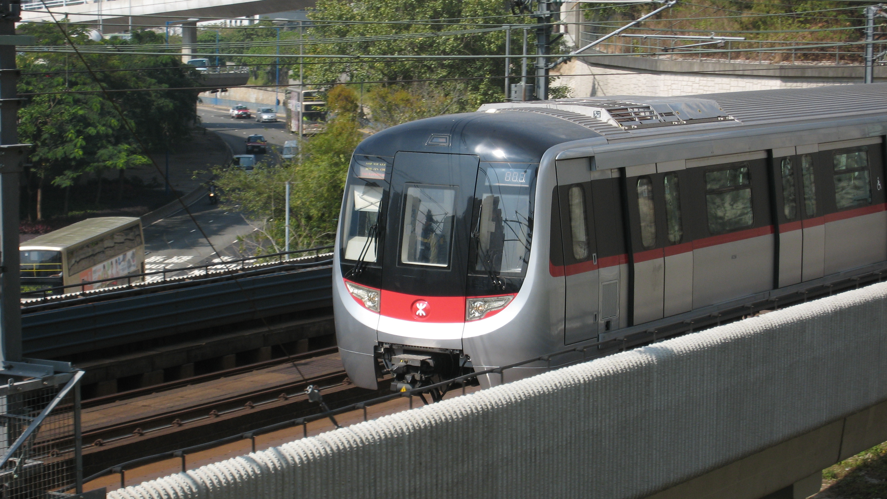 第3編組列車（編號A/C/B 355~356）在九龍灣,車序007